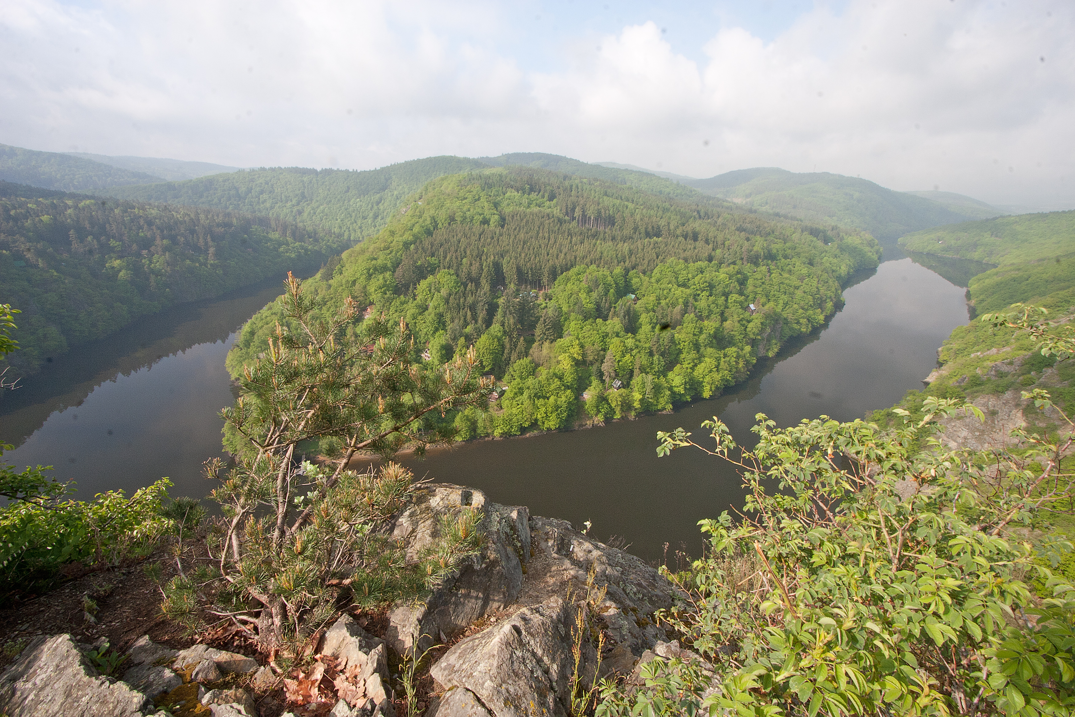 Smetanova vyhlídka květen 2012